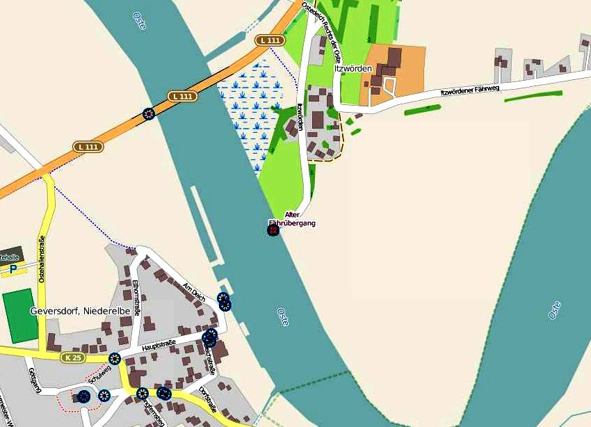 Geversdorf, alte Fährstelle